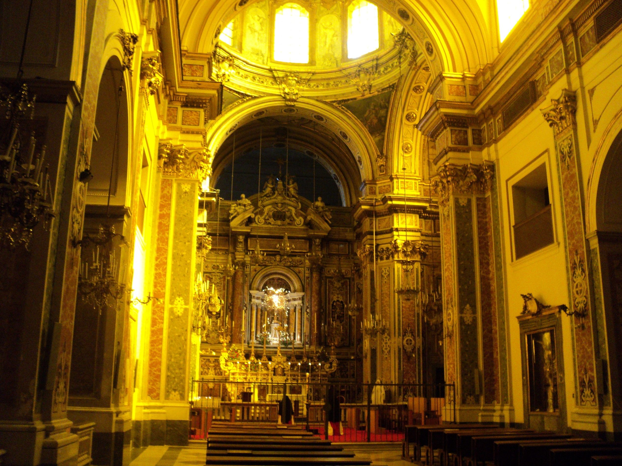 Chiesa di San Giuseppe dei Ruffi (Napoli)